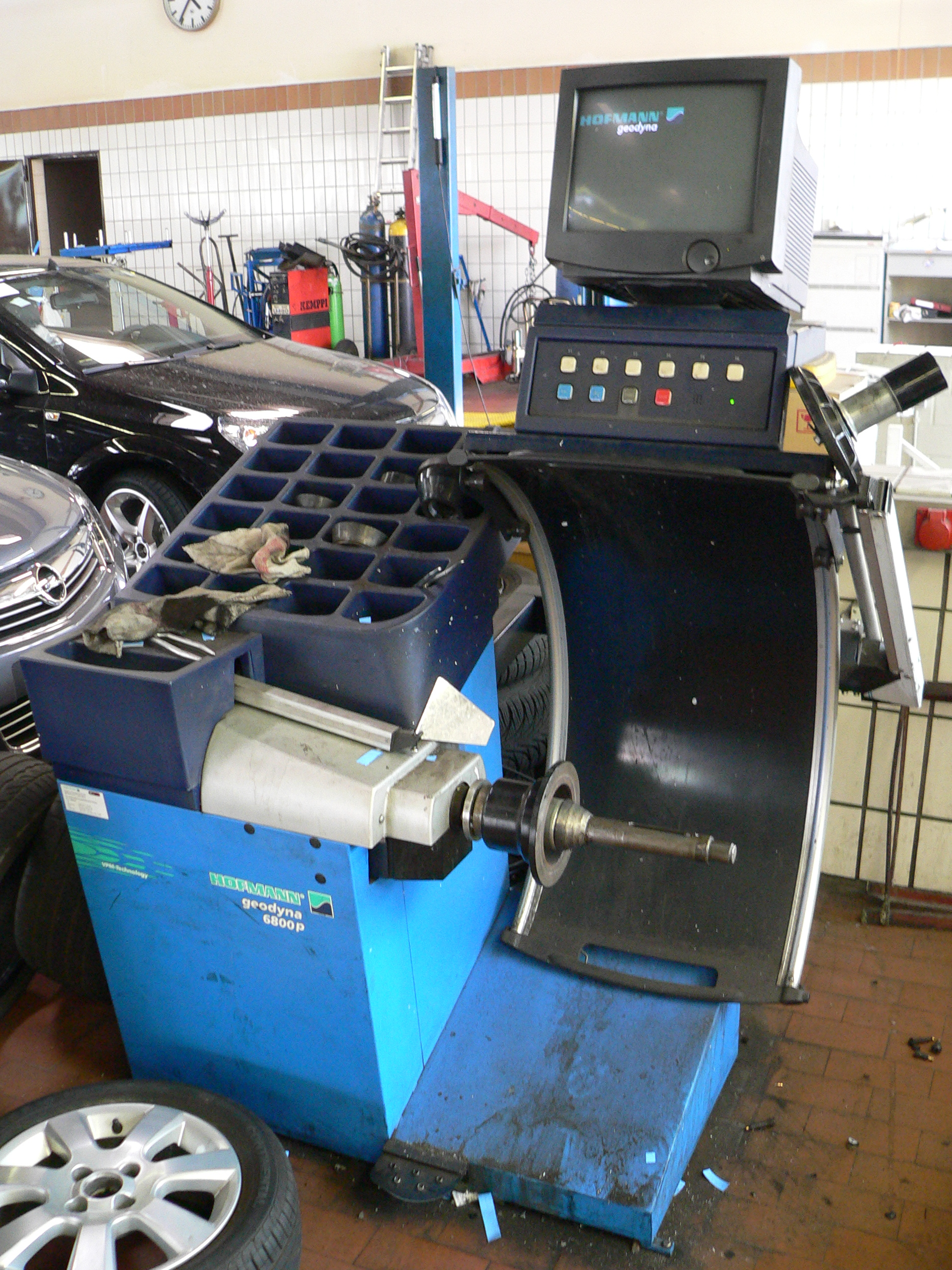 Bildinhalt: Radauswuchtmaschine ohne Rad Aufnahmeort: Mannheim, Deutschland